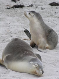 Lions de mer à Kangaroo Island (Australie)